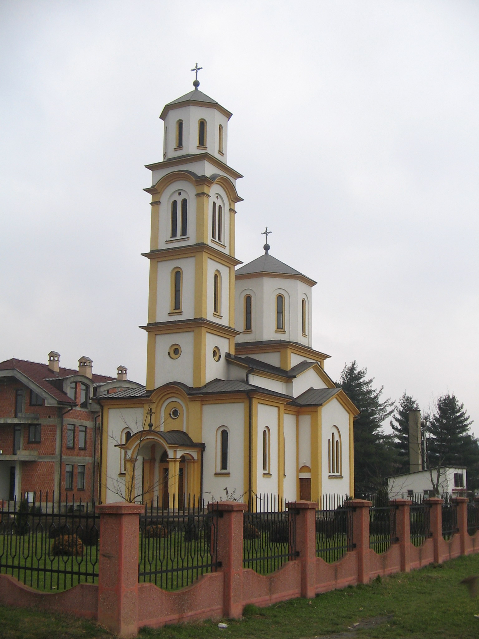 храм Св. вмч. кнеза Лазара у насељу Лазарево